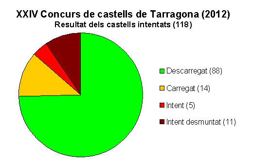 Estadística dels 118 castells intentats al XXIV Concurs de castells de Tarragona, celebrat els dies 6 i 7 d'octubre de 2012 a la Tarraco Arena Plaça de Tarragona.